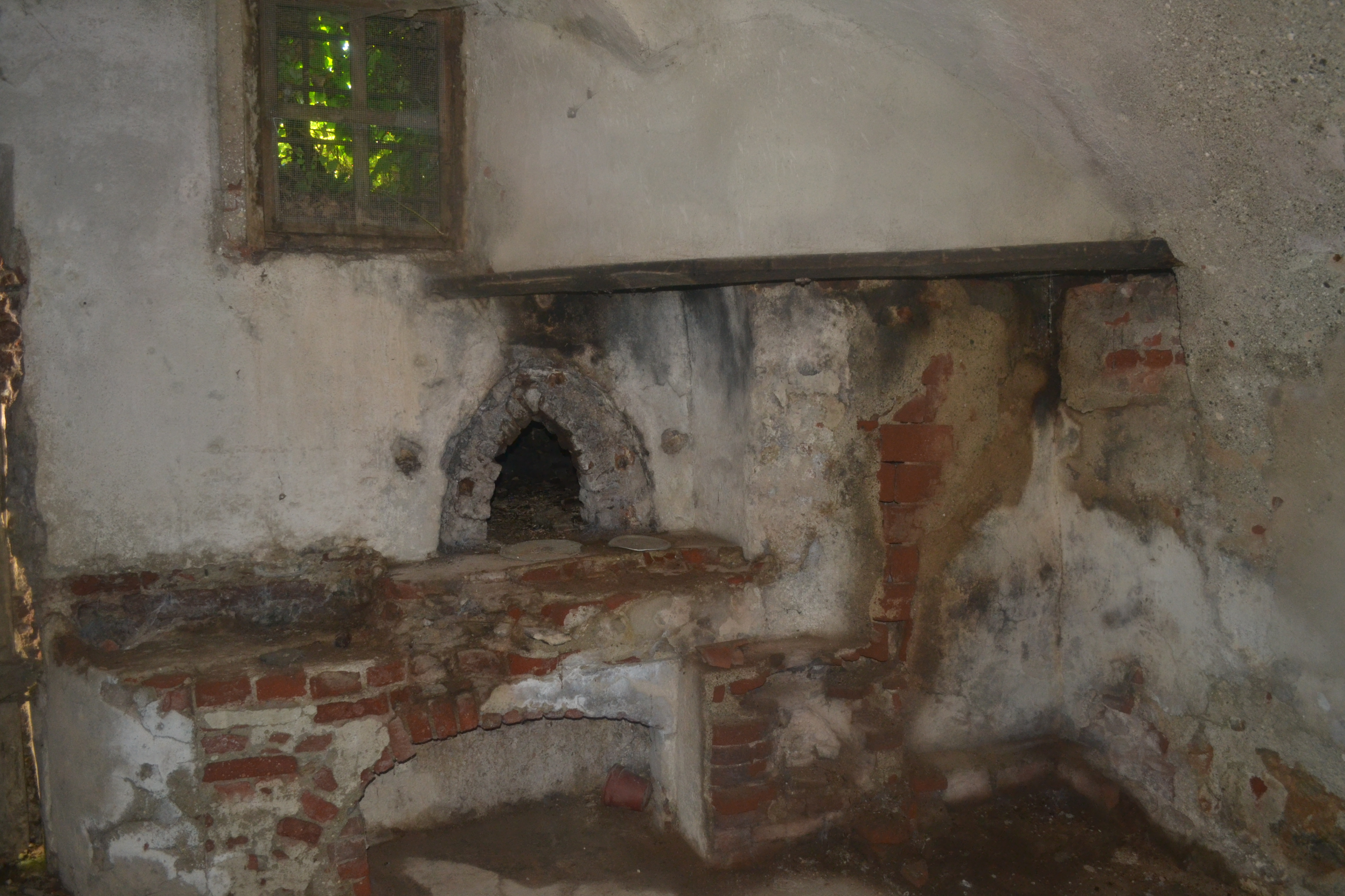 Santuario Santa Lucia Villanova Mondovì - Il forno a legna per il pane 1600 ca